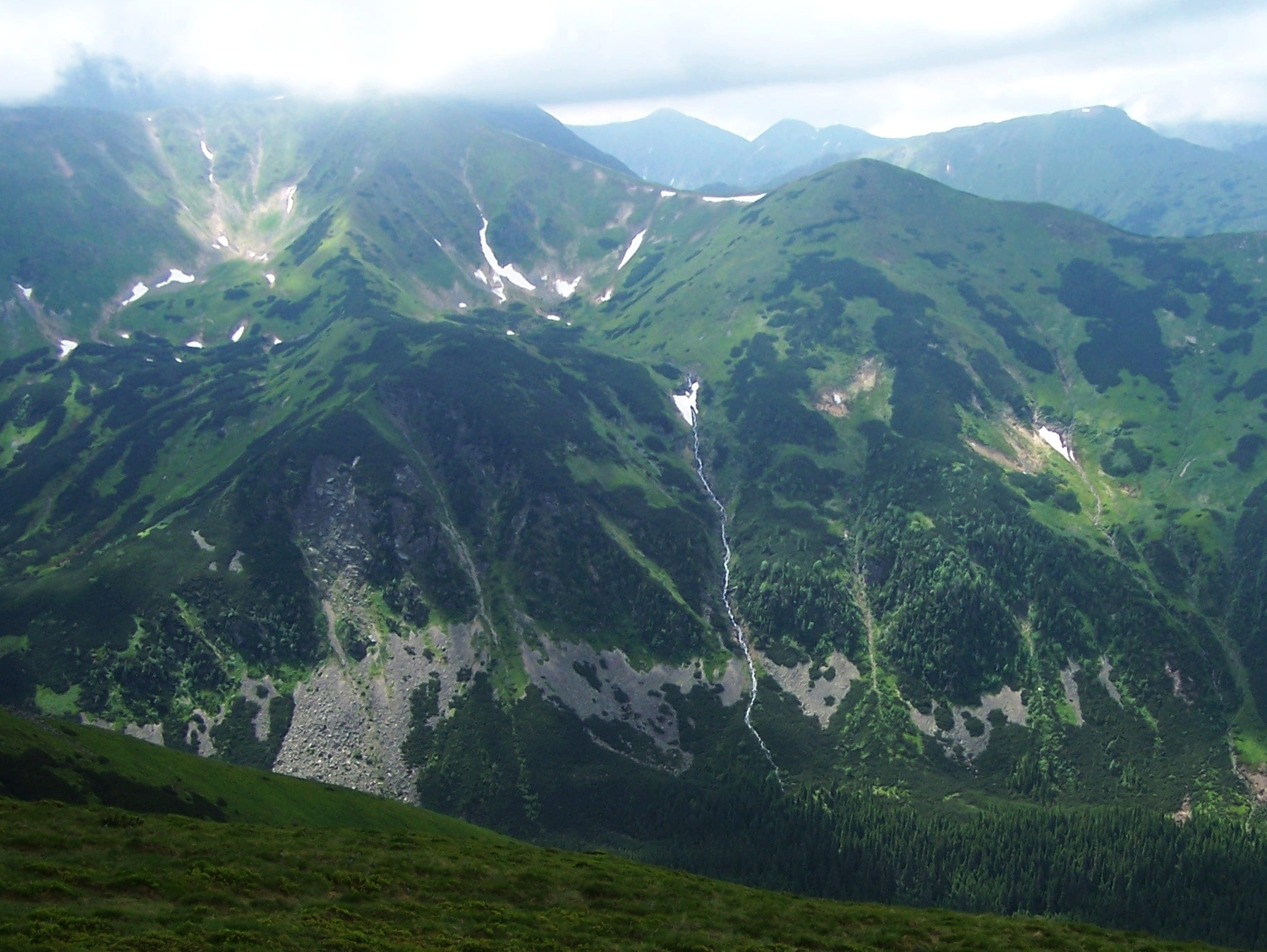 Żleb Wielka Szerba (ze spływającym strumieniem) w Dolinie Starorobociańskiej. Widok z Ornaku